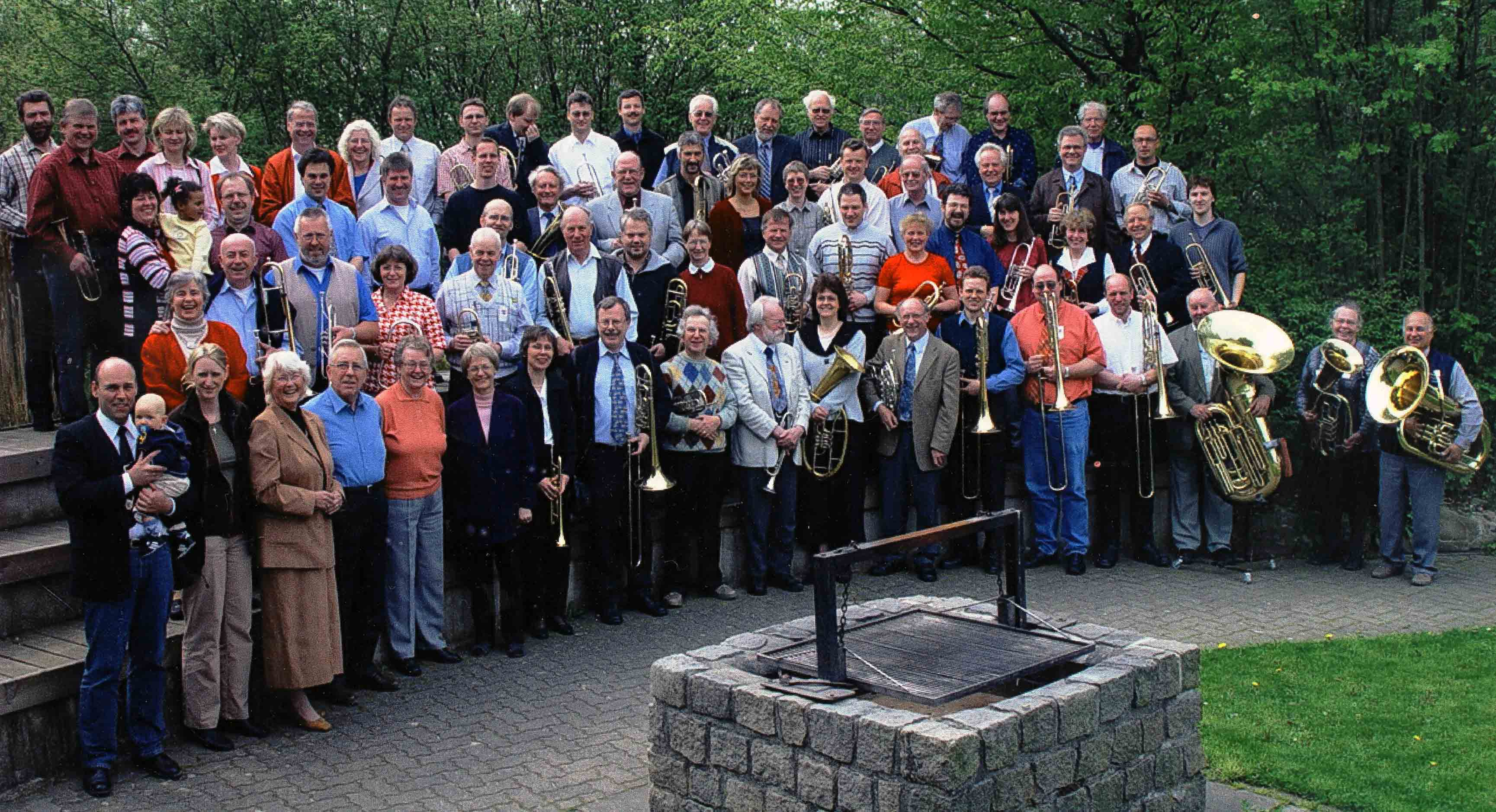 Jahreshauptversammlung des Gnadauer Posaunenbundes 2004 am Wittensee